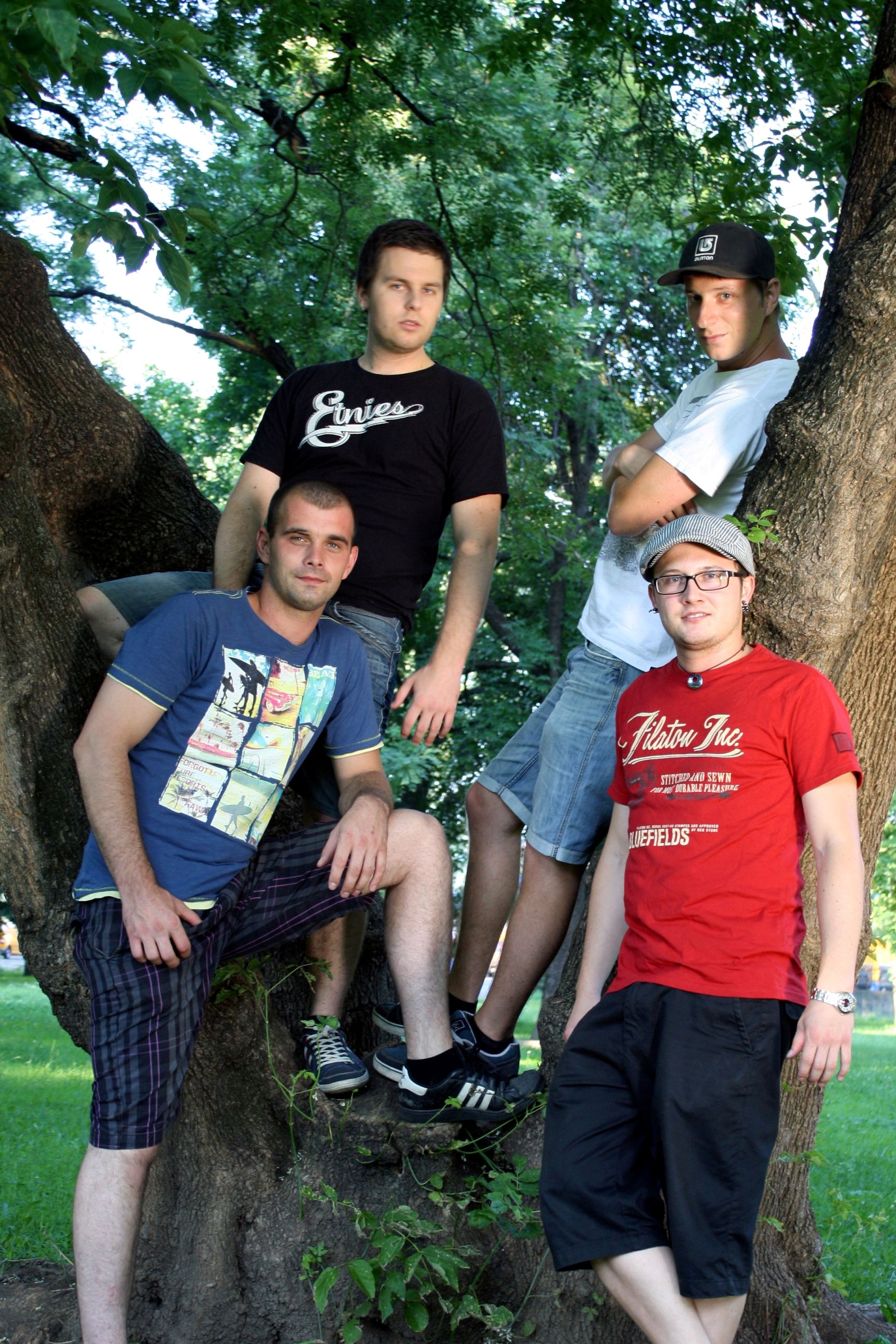 Kapela Podfuck v Košiciach, v parku pri Železničnej stanici.